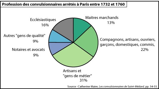 Professions des convulsionnaires arrêtés à Paris au 18e siècle